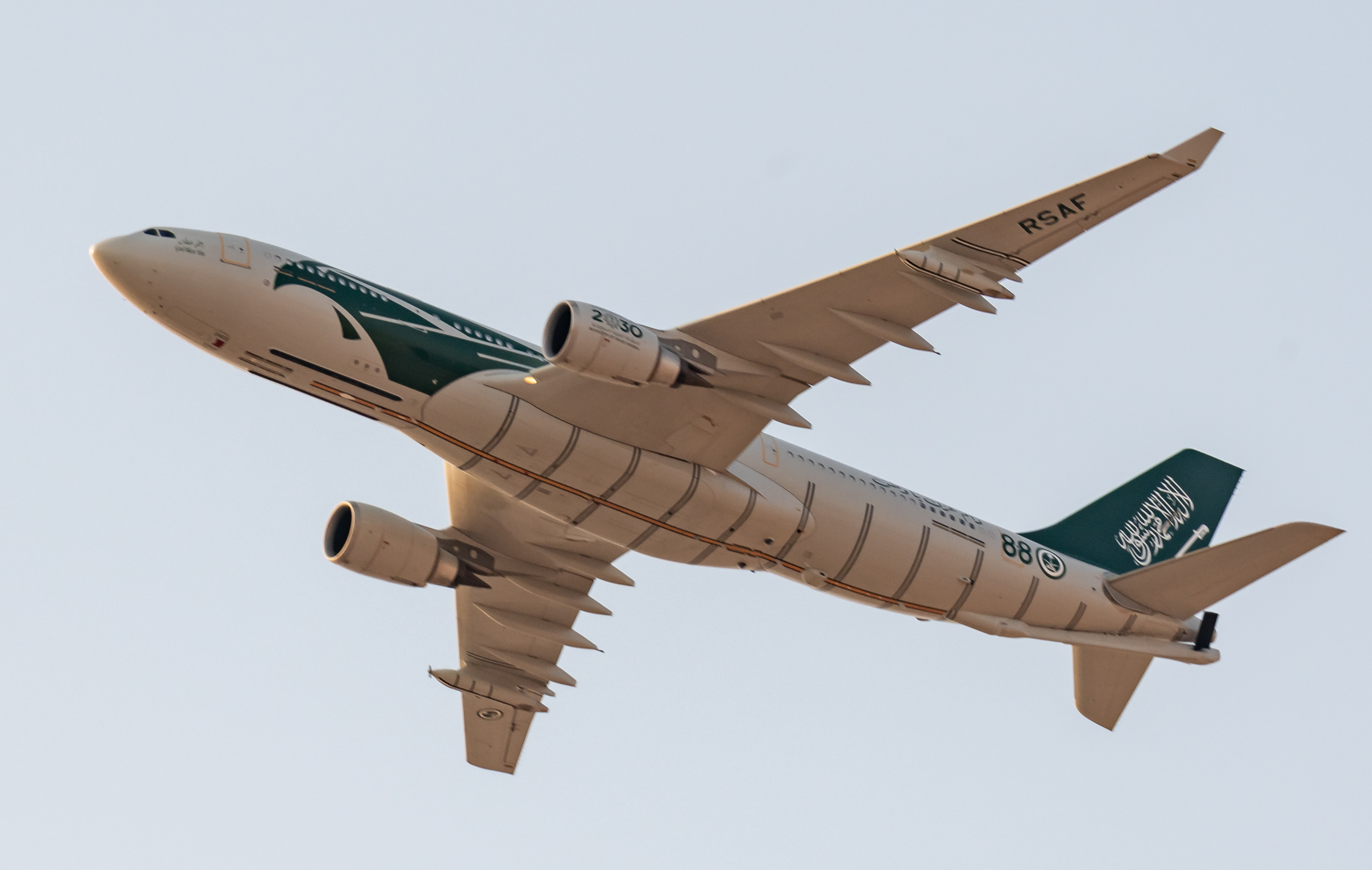 ARH_9811